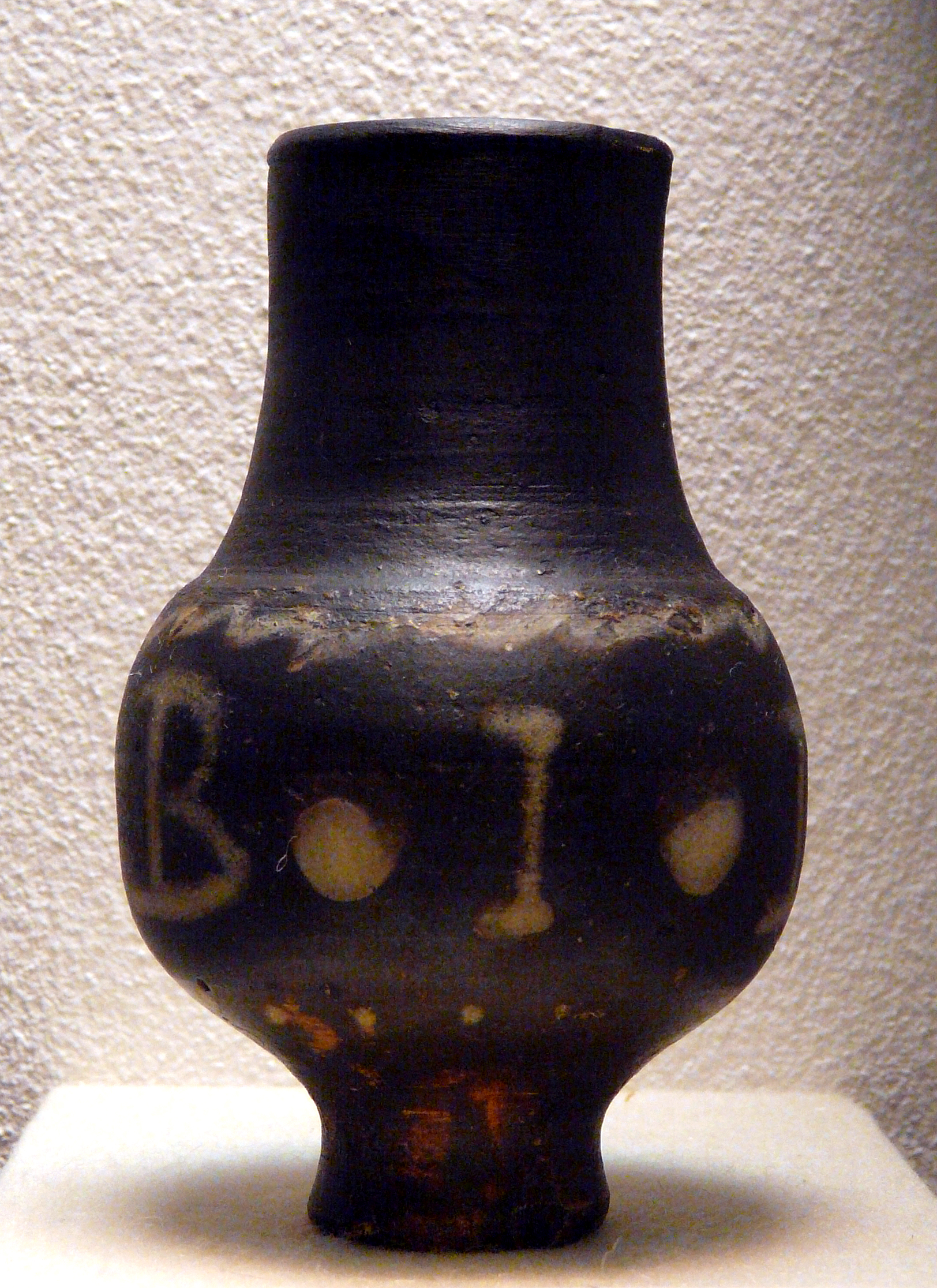 Spruchbecher: B•I•B•E („Trinke!“) , schwarz engobierte Ware, 3./4. Jh., aus Novaesium, Clemens-Sels-Museum, Neuss